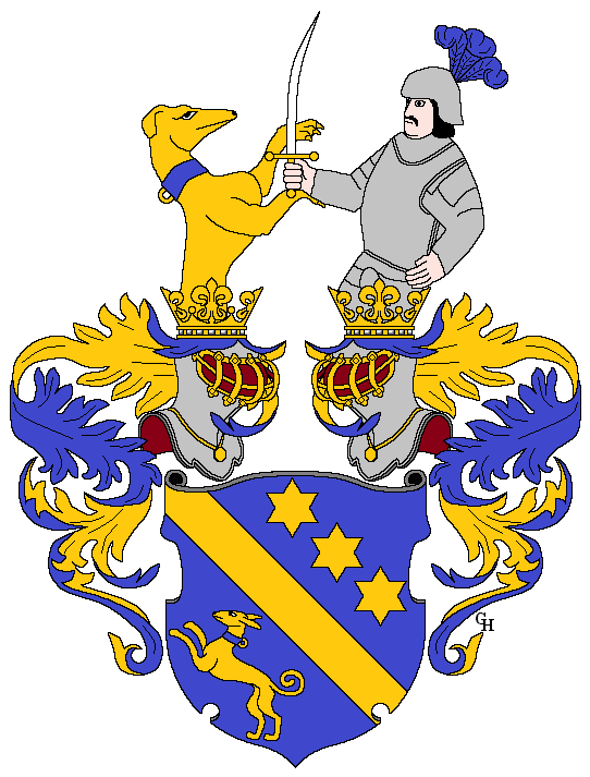 Wappen des österreichischen Postbeamten Thaddeus de Colerus, verliehen anlässlich seiner Erhebung in den österreichischen Adelsstand mit dem Prädikat "von Geldern" 1878. Zeichnung von Gerd Hruška ( Für weitere Informationen zu dieser Standeserhebung siehe (